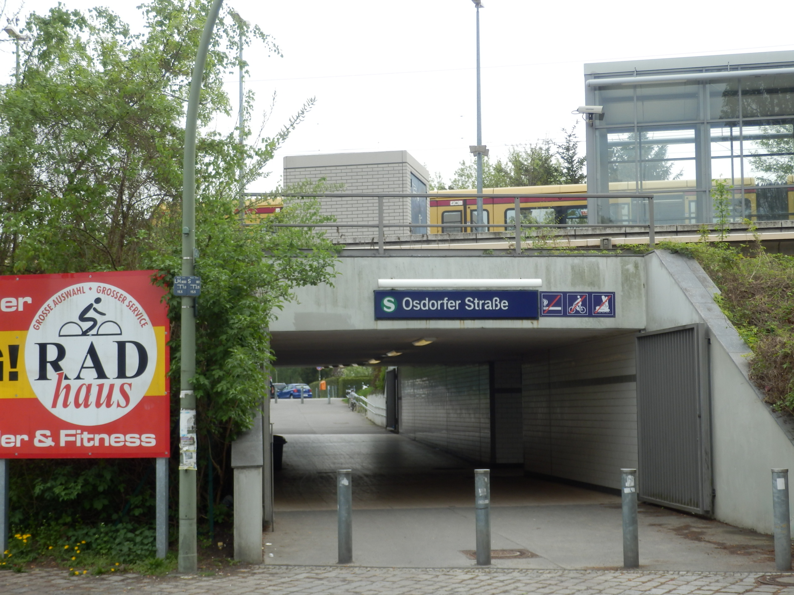 S-Bahnhof Osdorfer Straße Nordeingang, von Westen gesehen